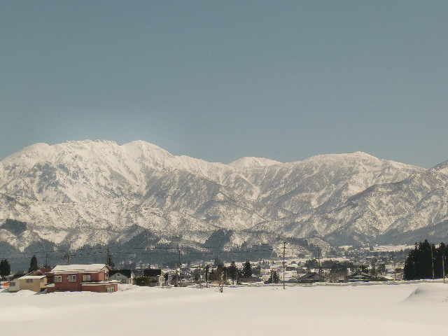 西から望む八海山（左）と阿寺山を望む。中央奥に見えるのは中ノ岳の山頂部。南魚沼市四十日より撮影。